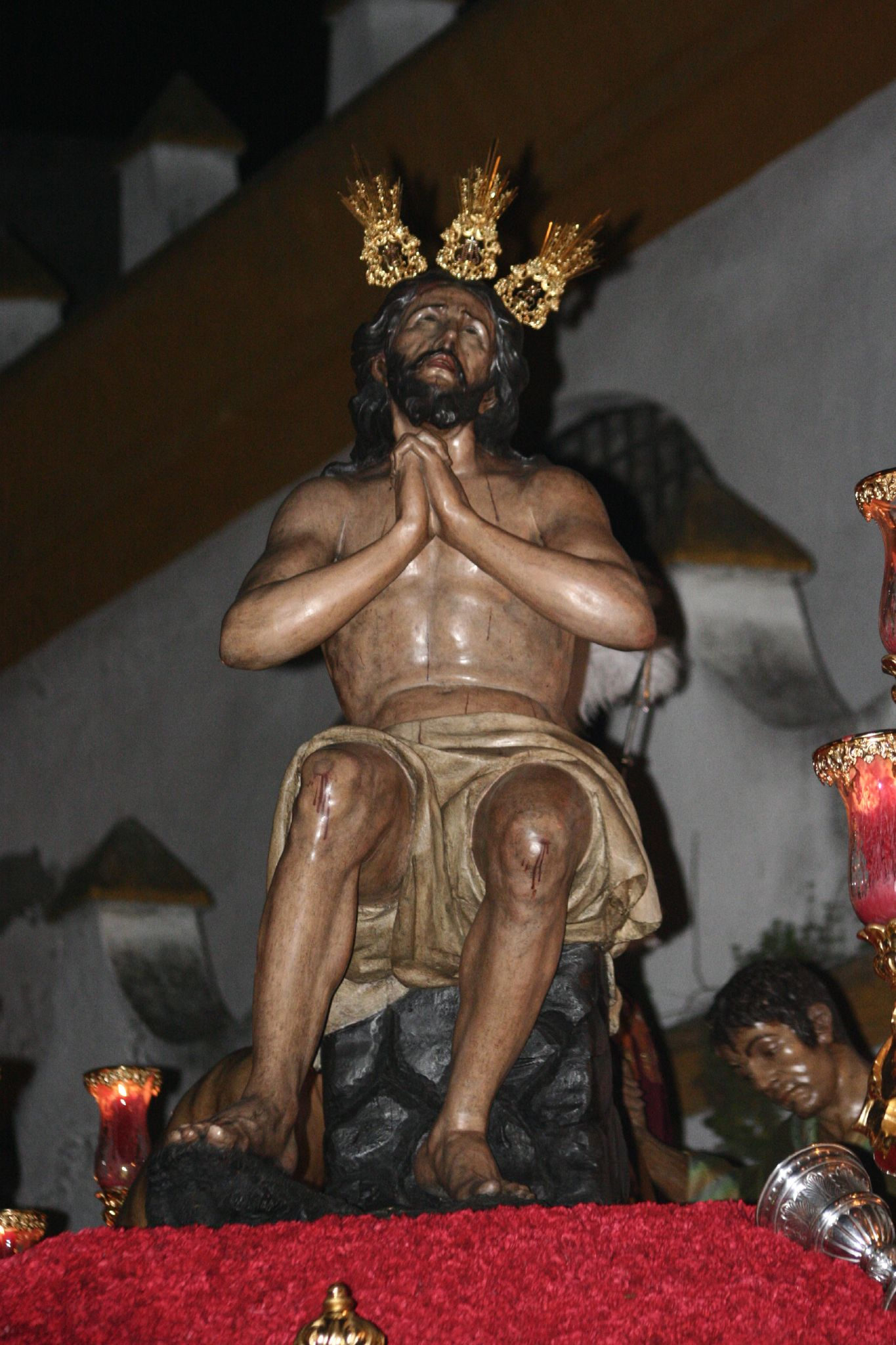 Nuestro Padre Jesús de las Penas. Semana Santa en Sevilla. Año 2006 Foto realizada y propiedad de Ángel Chacón